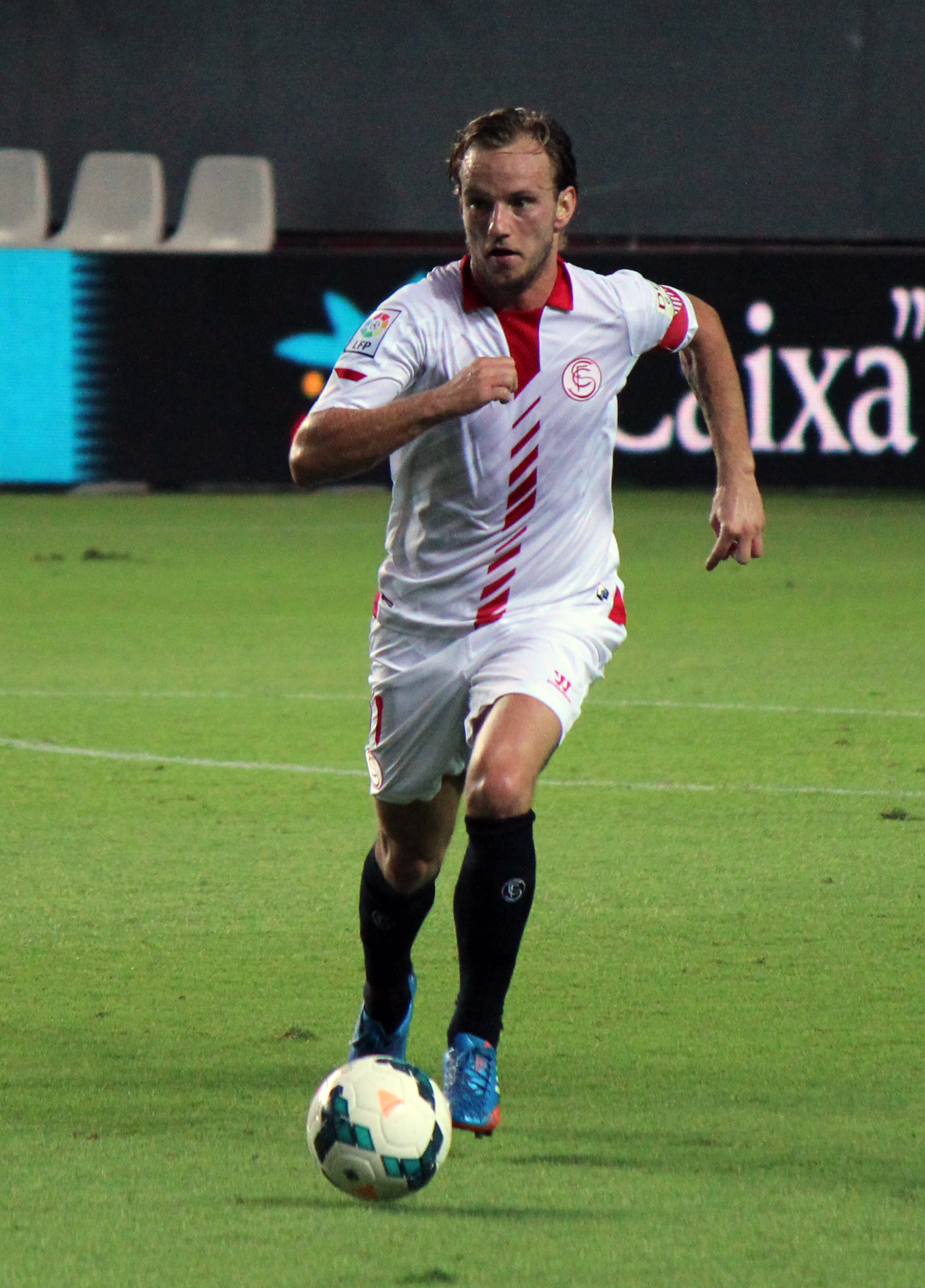 Rakitic en un partido con el Sevilla FC